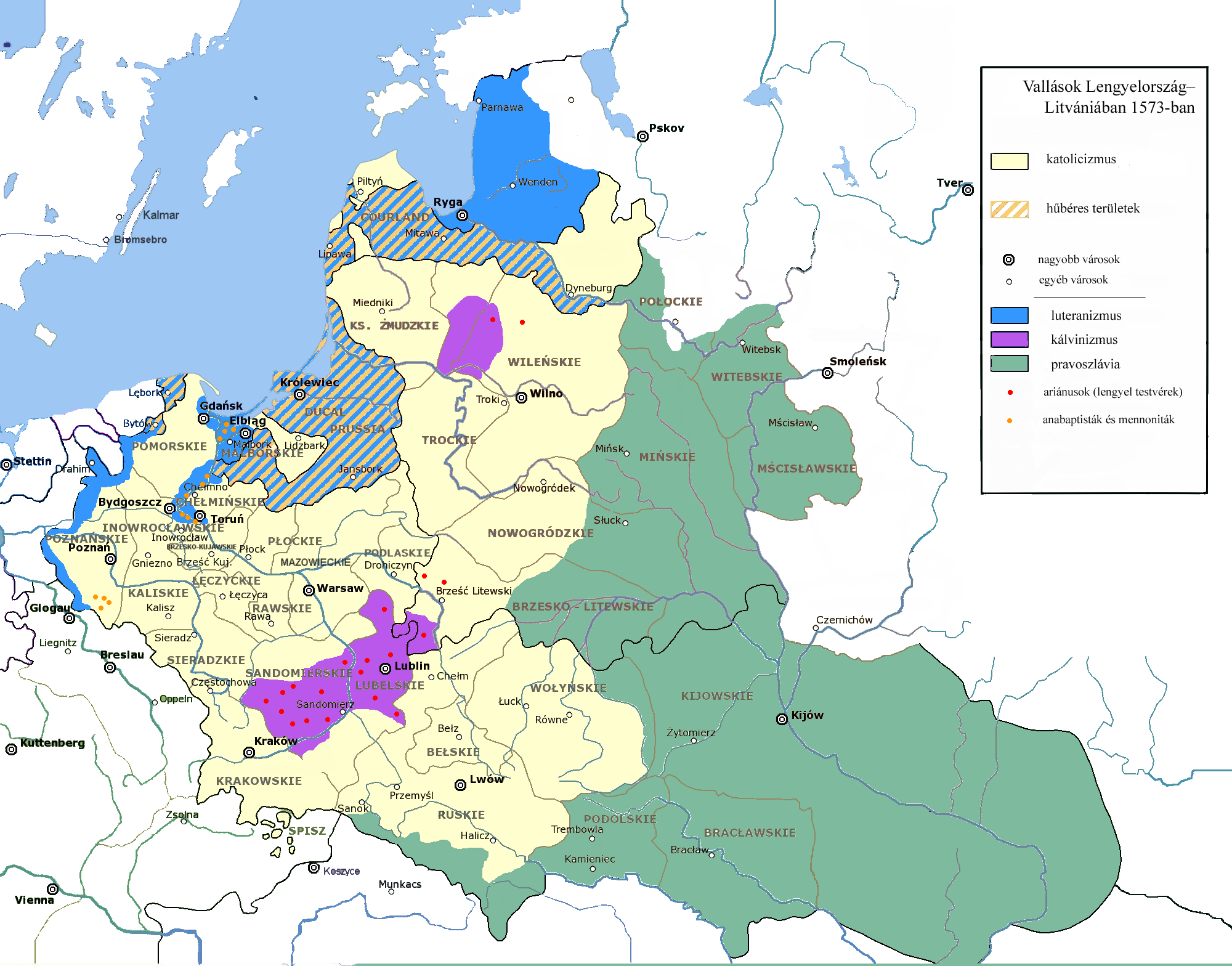 Vallások Lengyelország–Litvániában 1573-ban